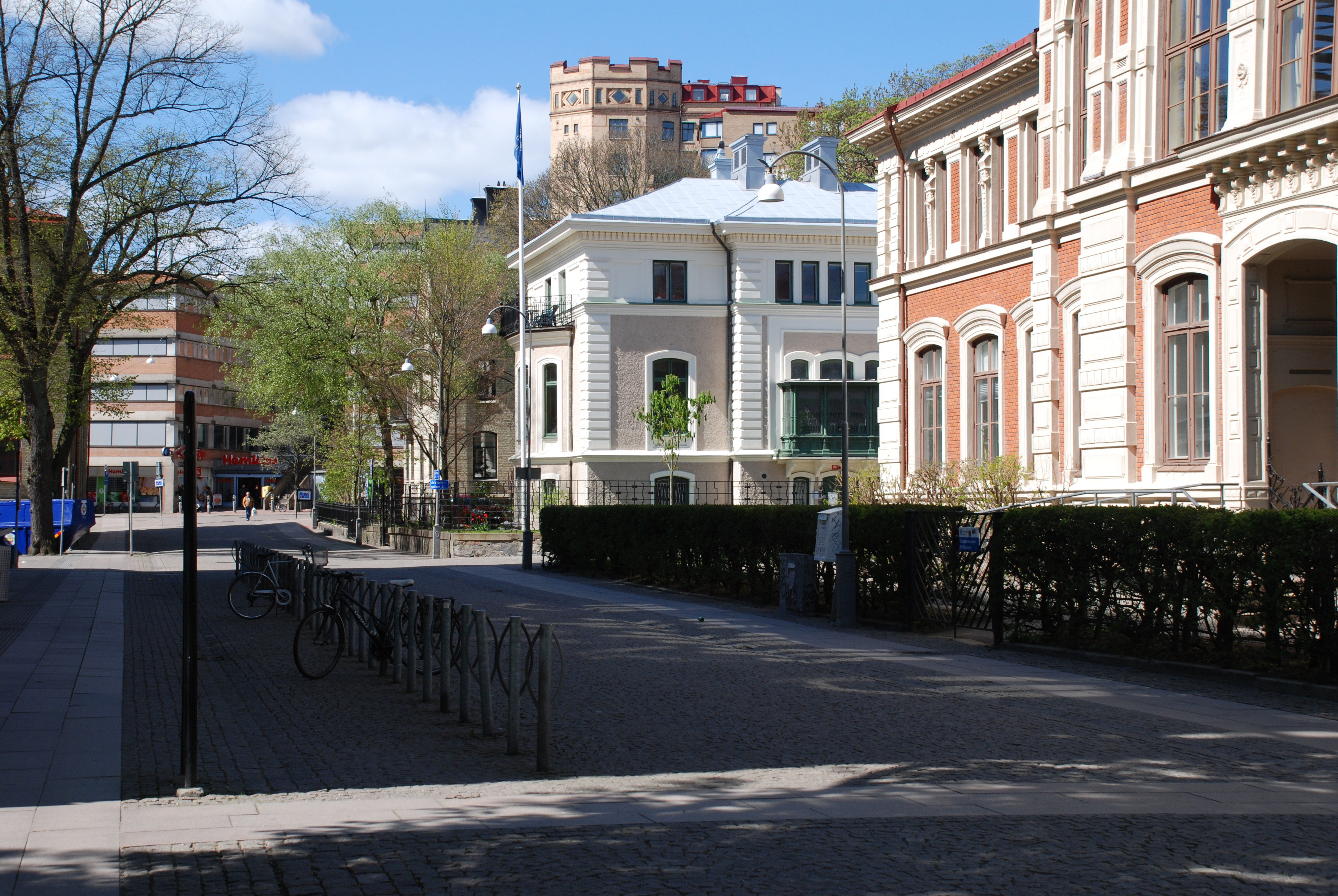 Läroverksgatan Inom Vallgraven i Göteborg i riktning från Magasinsgatan mot Hvitfeldtsplatsen.